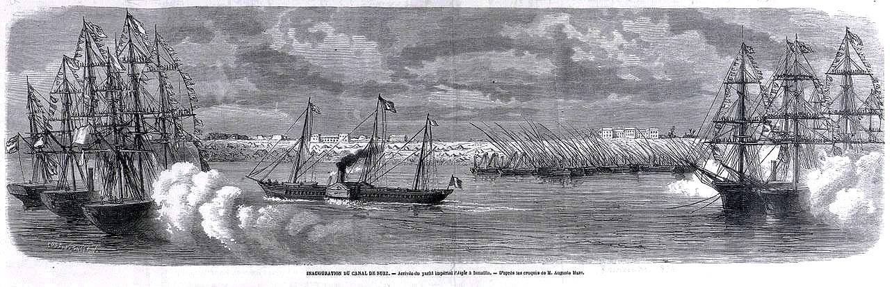 Inauguration du Canal de Suez. Arrivée du yatch impérial l'Aigle à Ismailia. D'après les croquis de Auguste Marc. L'Illustration du 11 Décembre 1869.